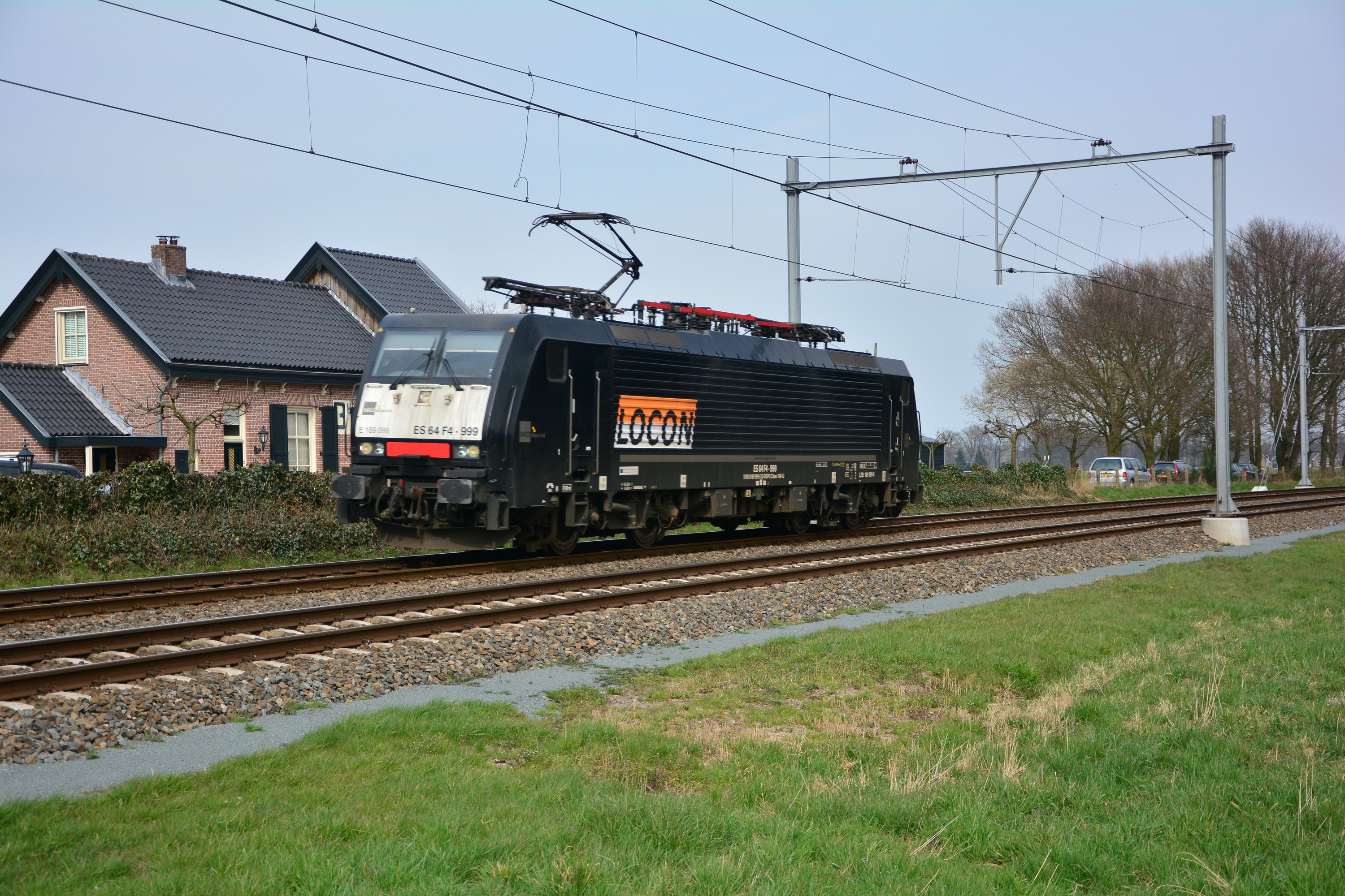 Locon 189 099 nadert de overweg in de Stationsweg te Teuge